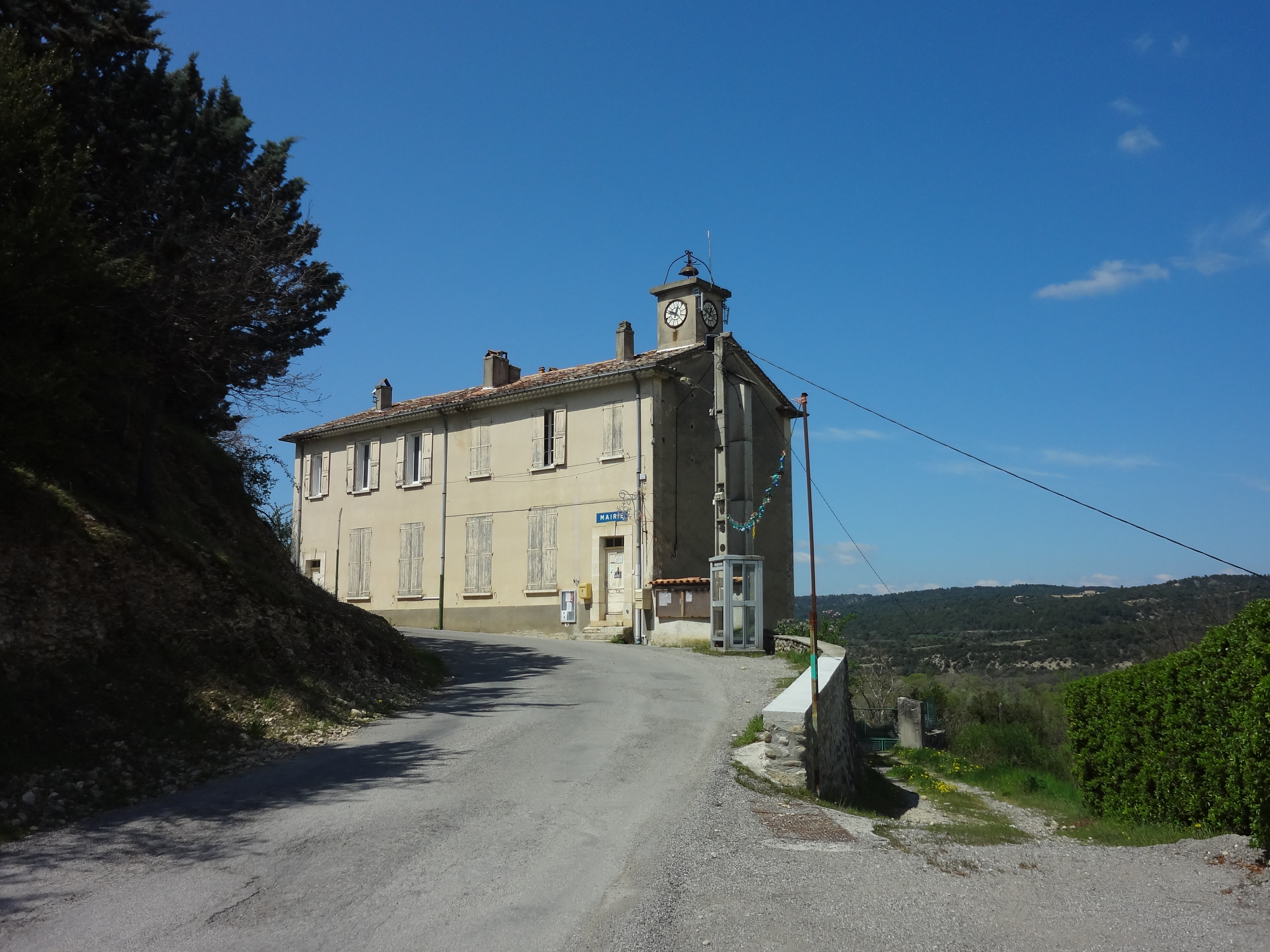 Mairie avec campanile